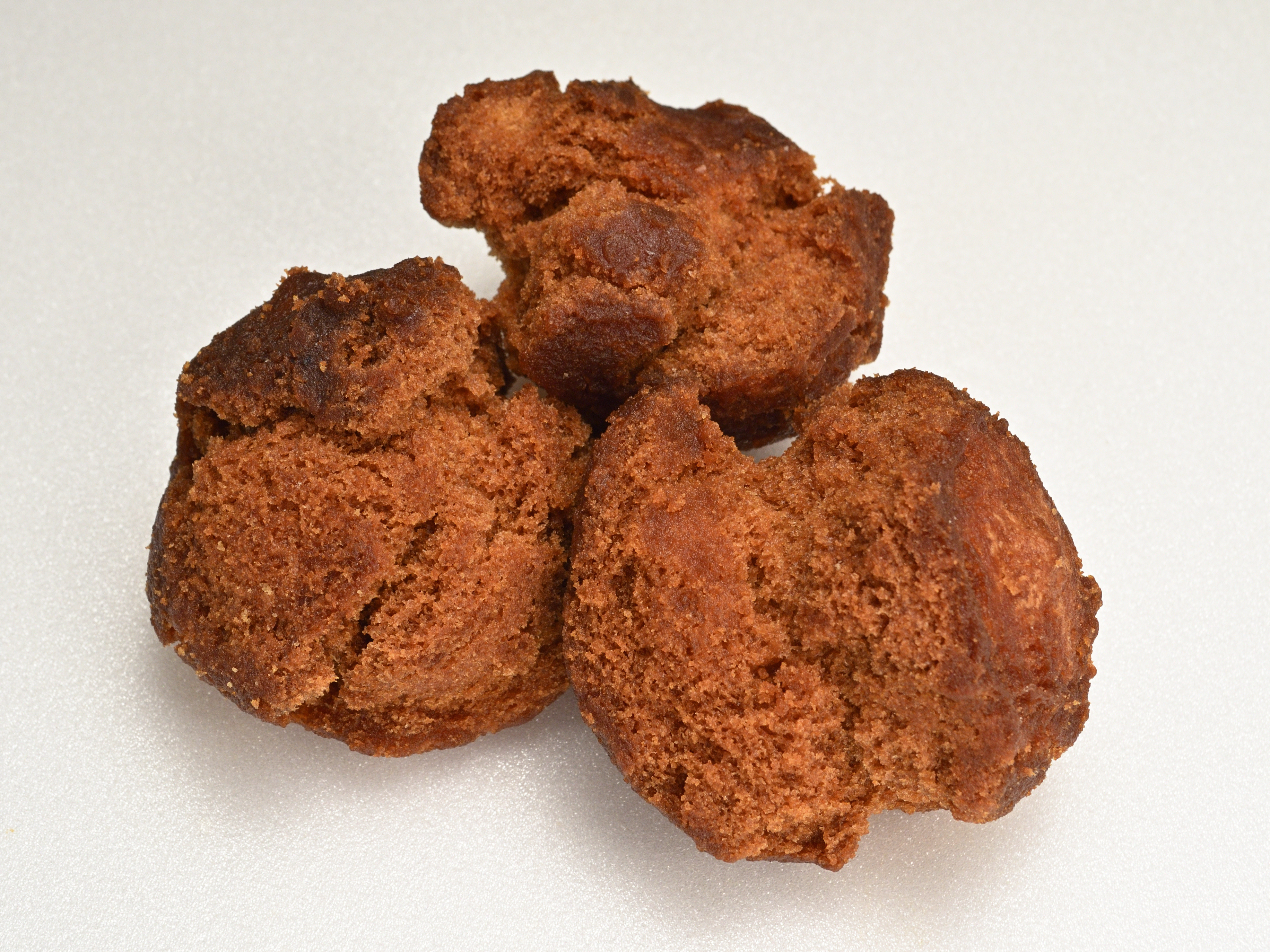 一般的なサーターアンダーギー